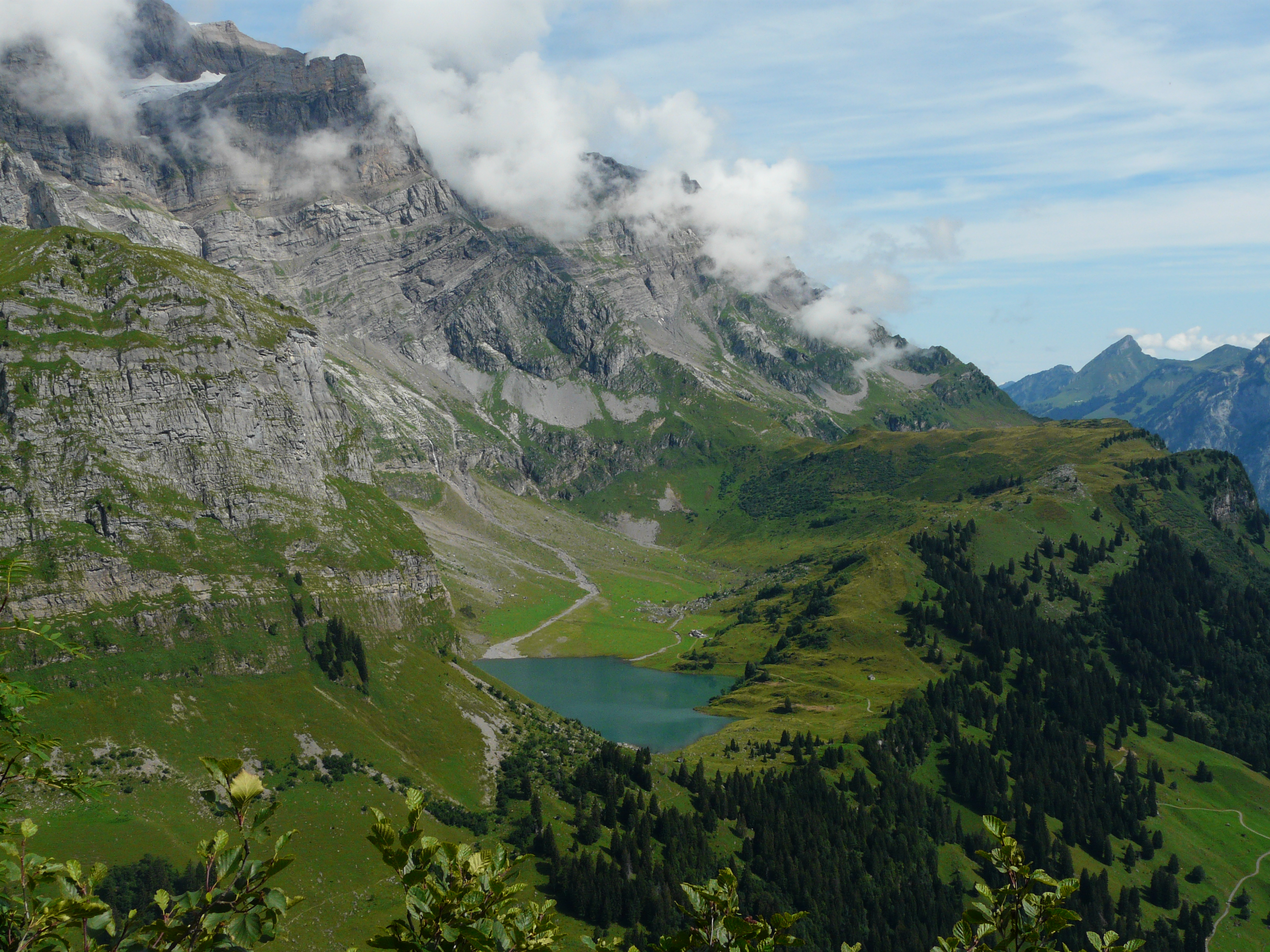 Oberblegisee (Blick vom Seblengrat)